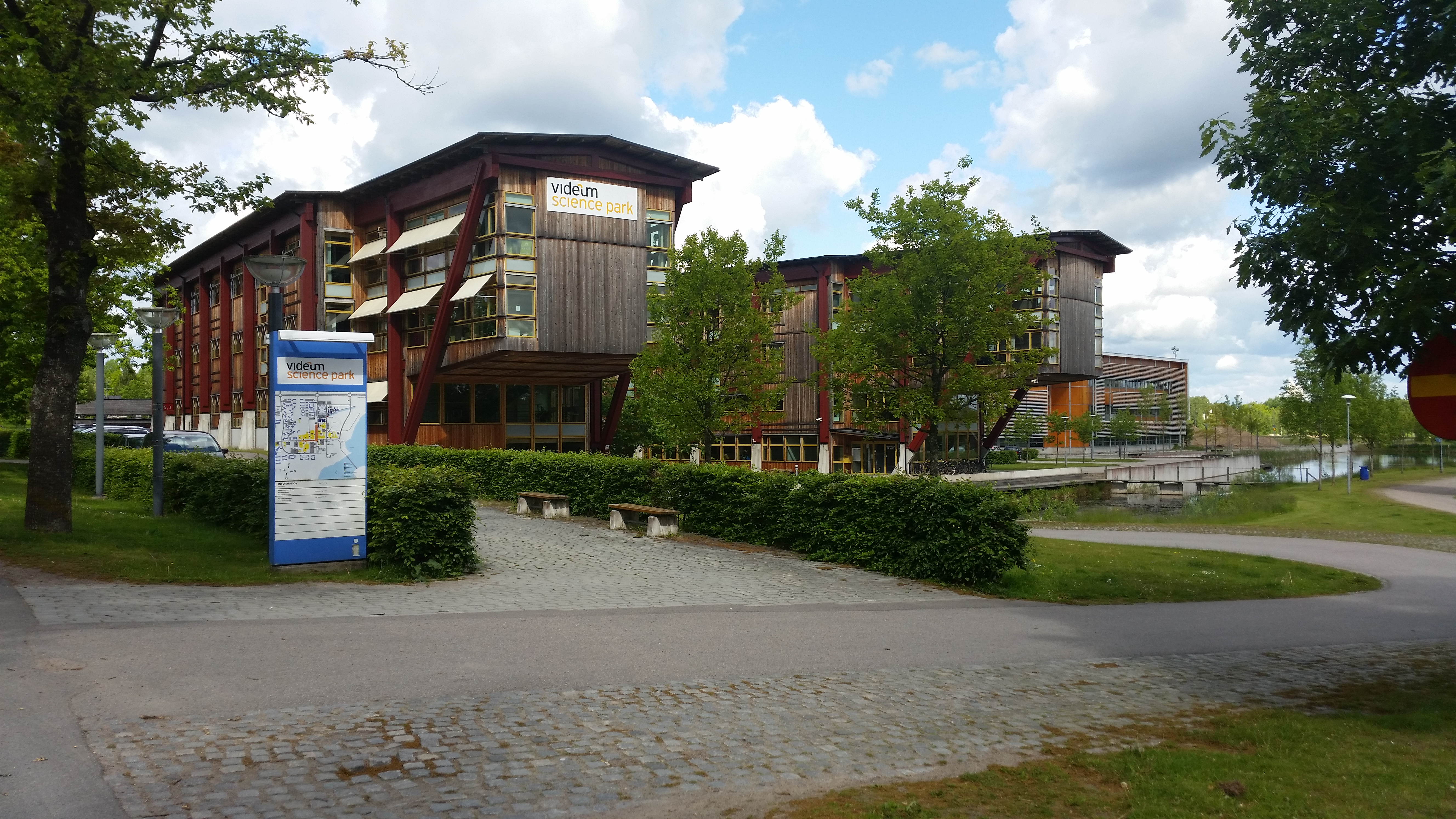 Hus Alpha och Bravo i Videum Science Park sett från Slottsallén.